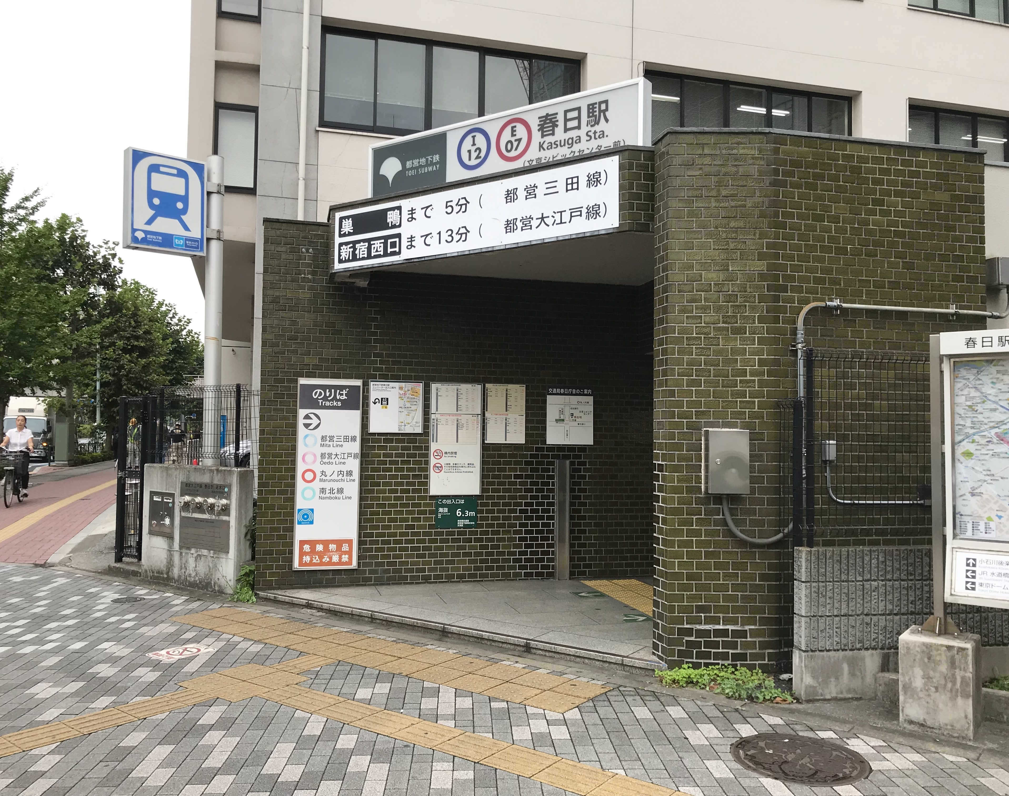 都営地下鉄三田線・大江戸線春日駅A1番出入口